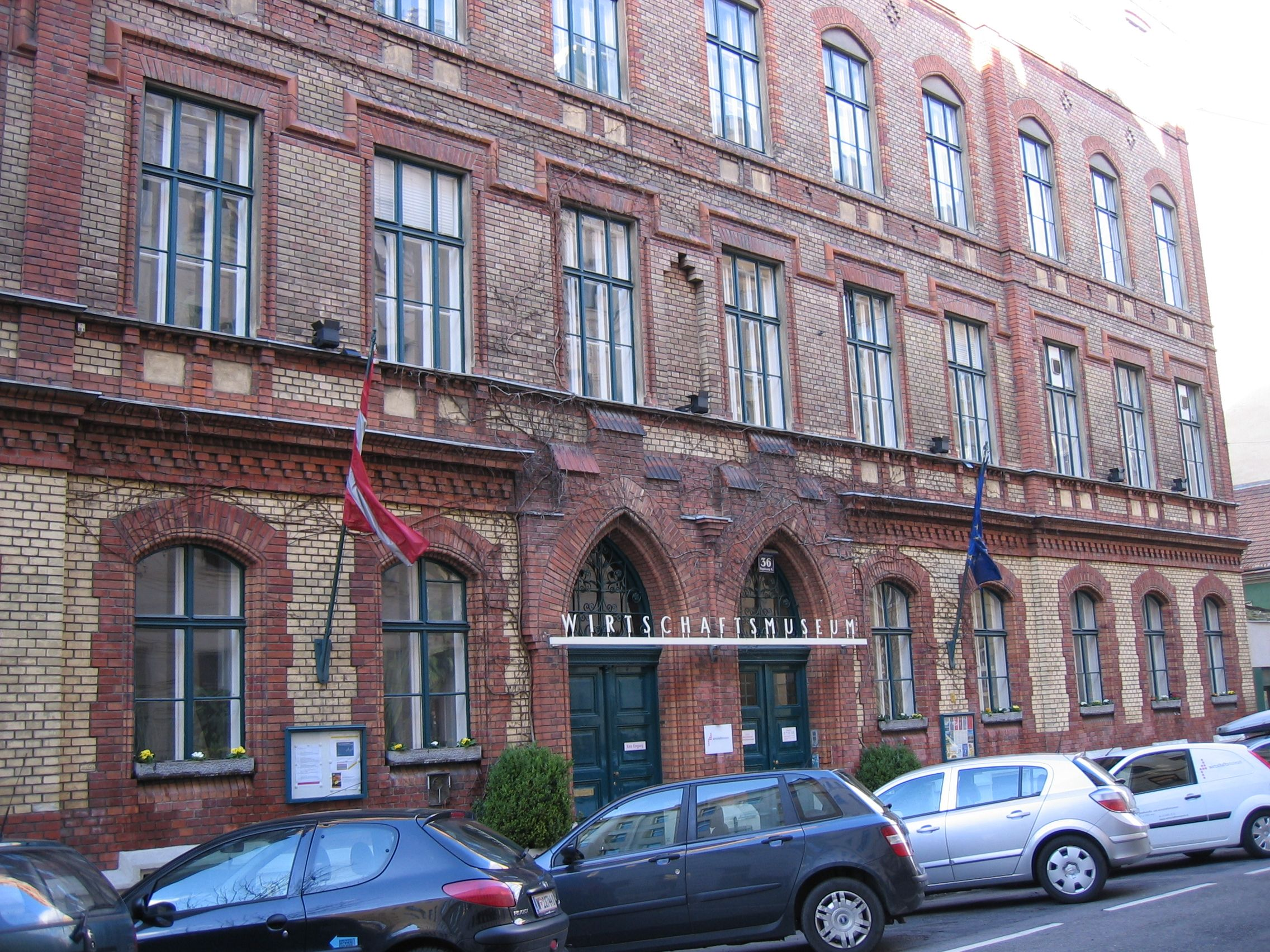 Wirtschaftsmuseum